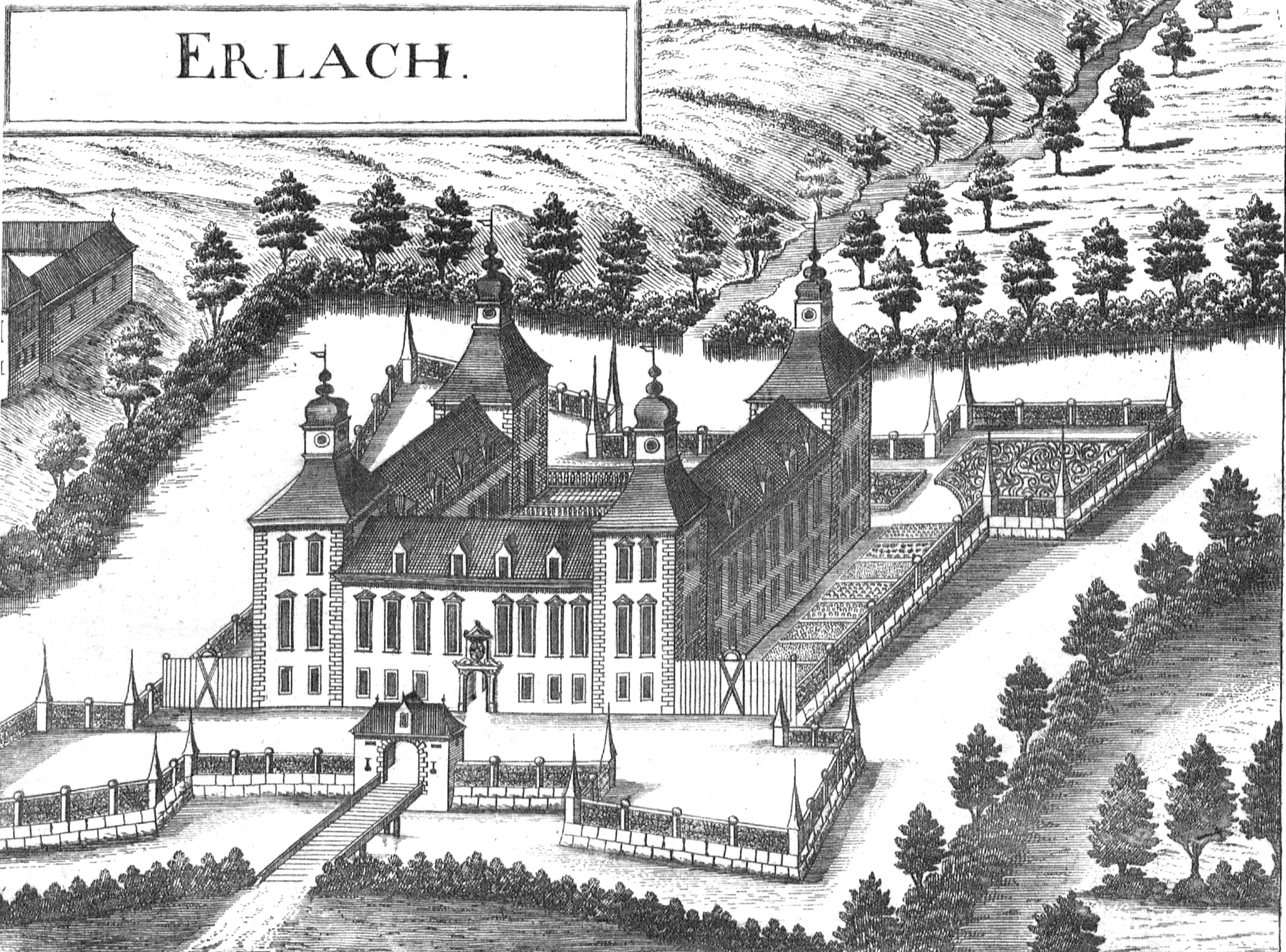 Schloss Erlach bei Kallham nach einem Stich von Georg Matthäus Vischer von 1674